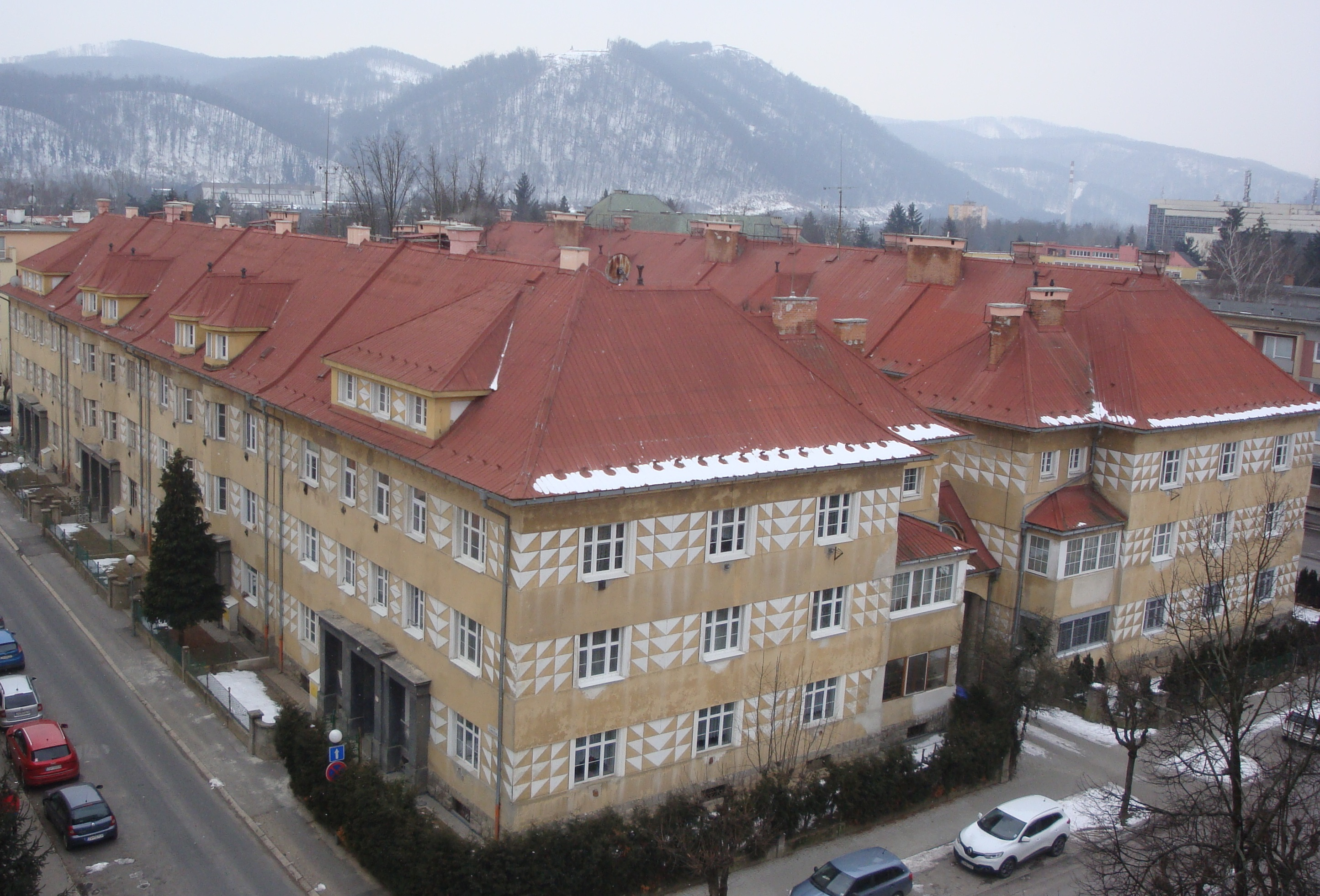 Fotografia zo Študentskej ulice, v pozadí Pustý hrad.